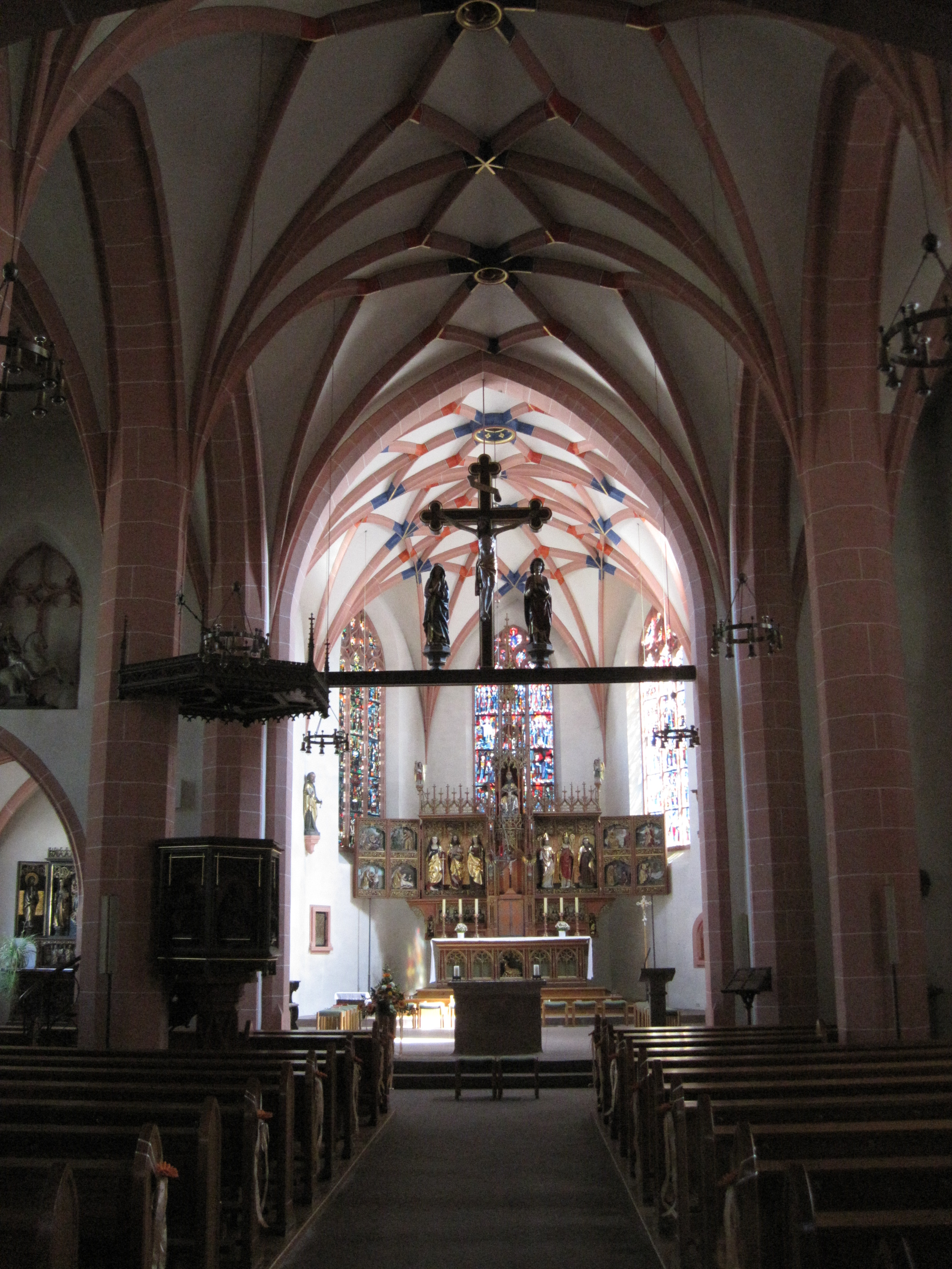 Innenansicht der St. Martinskirche in Oestrich/Rheingau